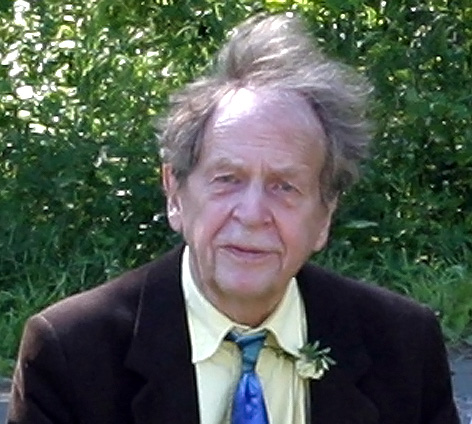 Stig Ossian Ericsson 24 juni 2004, närbild